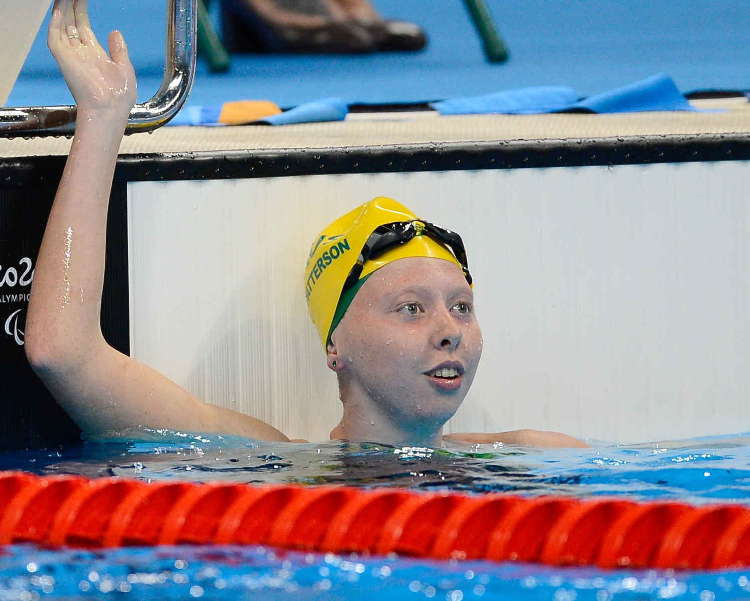 Rio de Janeiro - Lakeisha Patterson, da Austrália, comemora ao vencer a final dos 400m nado livre S8 nos Jogos Paralímpicos Rio 2016, no Estádio Aquático. (Fernando Frazão/Agência Brasil)